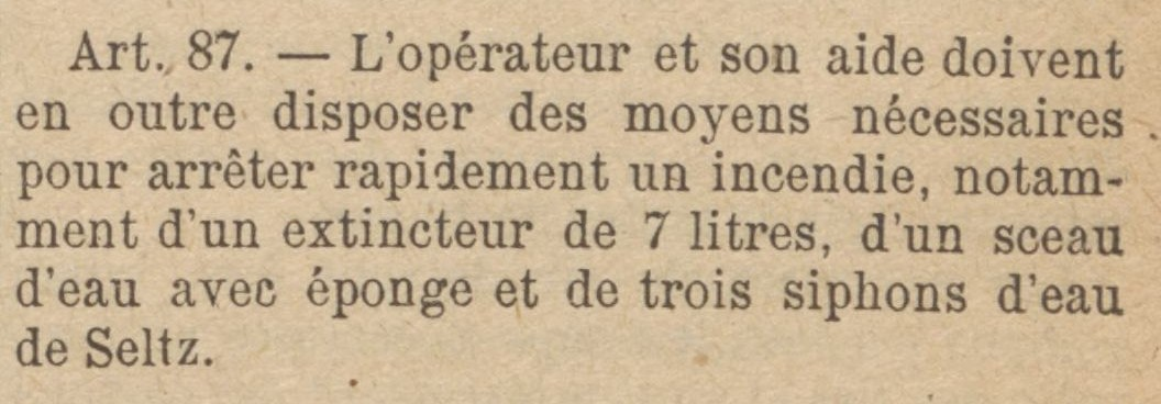 Extrait de l'Ordonnance de police du 8 juillet 1929 concernant les fêtes foraines en région parisienne Préfecture de police., Ordonnance concernant les fêtes foraines., 8 juillet 1929, Titre IV Mesures de sécurité., Chapitre III. Théâtres, cirques et autres spectacles. § 3. - Dispositions spéciales aux cinématographes. Art. 87., Supplément au Bulletin municipal officiel de la ville de Paris, 9 août 1929, p.3835, 3ème colonne : Art. 87. — L'opérateur et son aide doivent en outre disposer des moyens nécessaires pour arrêter rapidement un incendie, notamment d'un extincteur de 7 litres, d'un seau d'eau avec éponge et de trois siphons d'eau de Seltz.